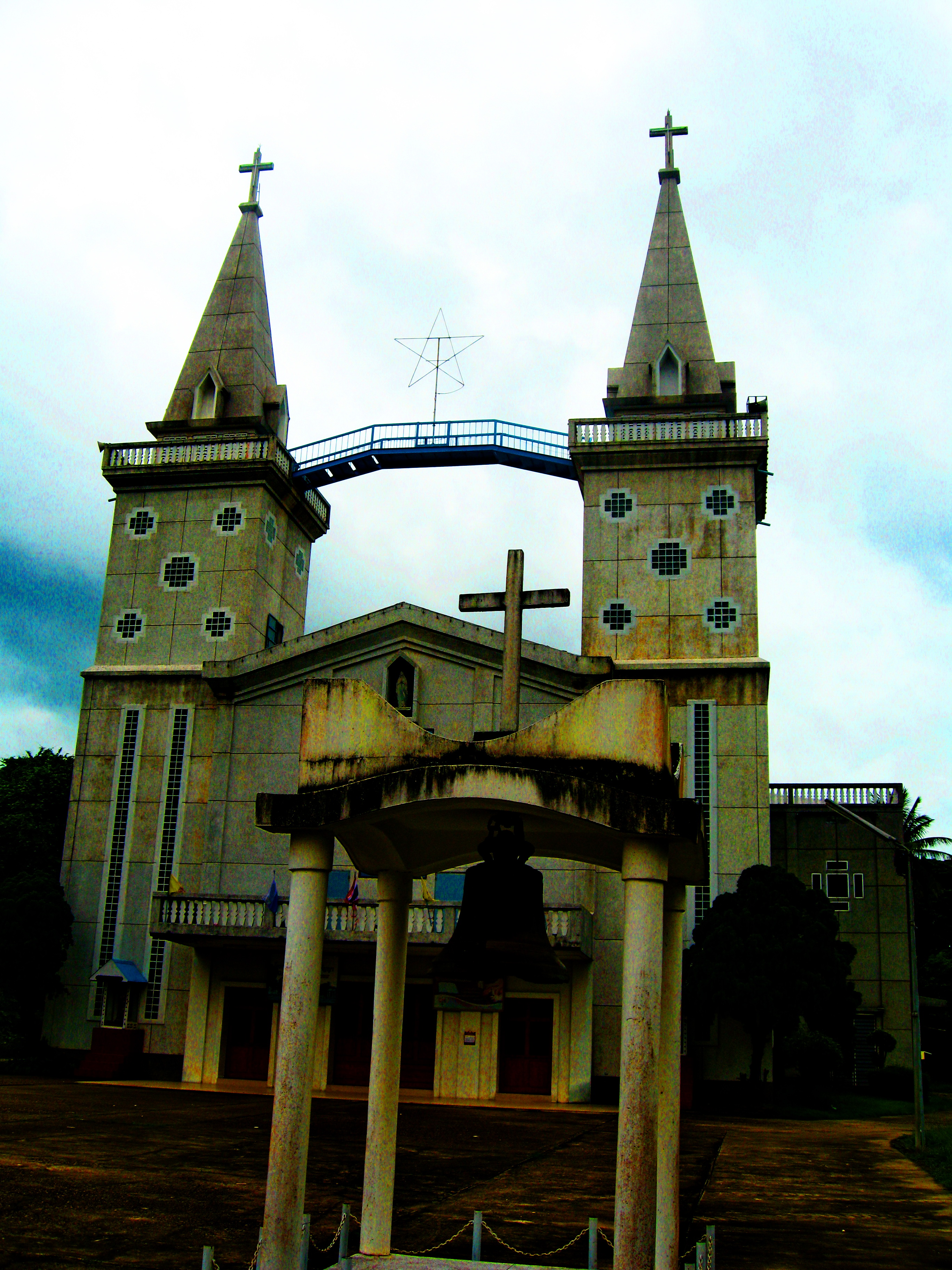 Church of Saint Anna Nong Saeng : โบสถ์นักบุญอันนา หนองแสง